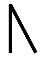 runic letter uruz